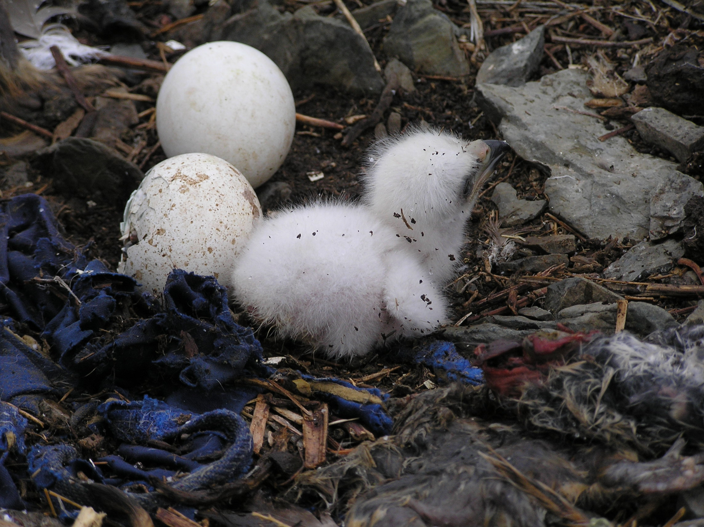 Степной орел (Aquila nipalensis). Кладка в процессе вылупления птенцов и первый вылупившийся пуховой птенец в гнезде на земле на склоне гряды. Юго-восточный Алтай, хр. Чихачева